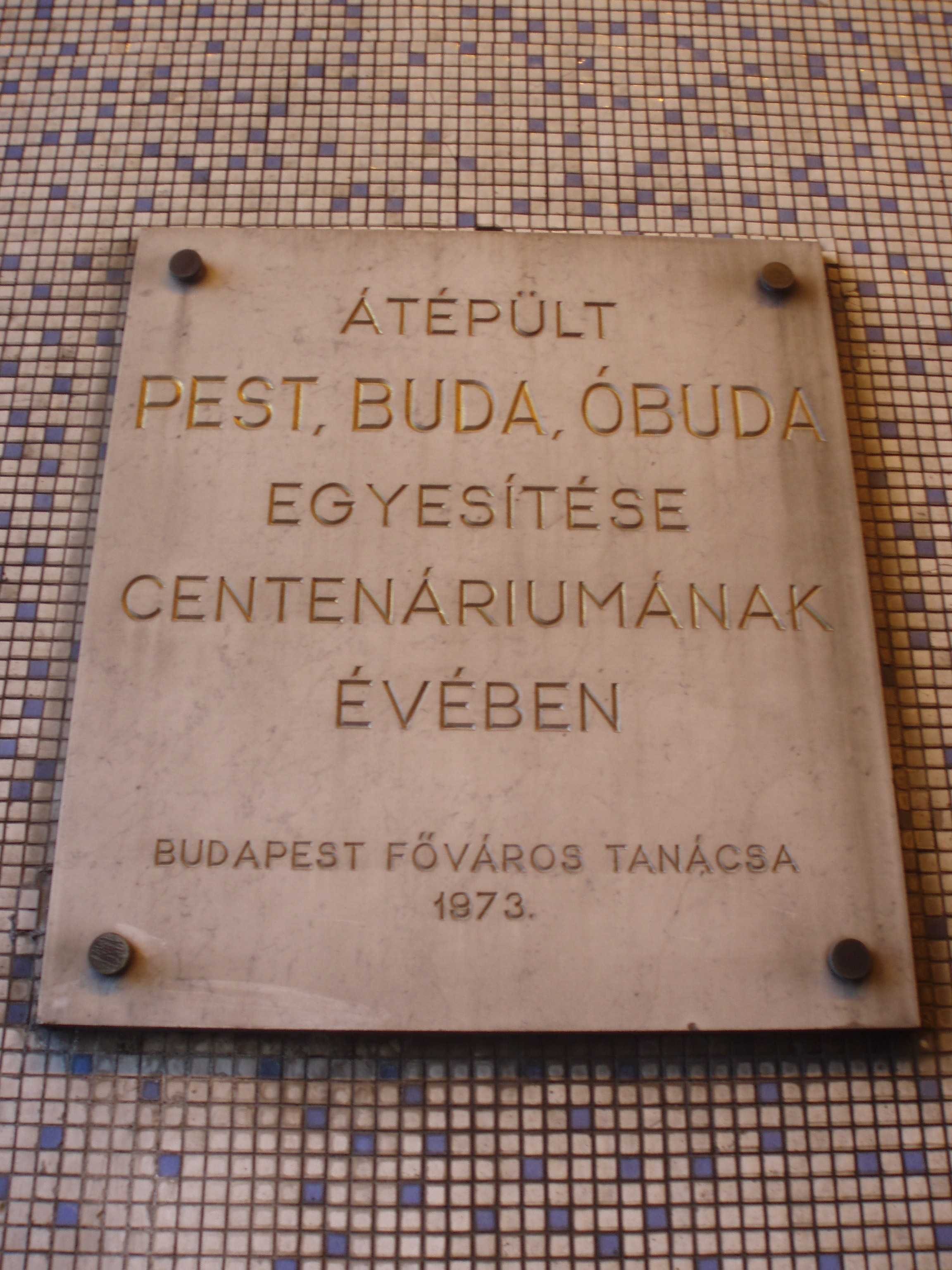 A Váralagút felújítását idéző emléktábla. Budapest, Váralagút.